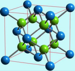 Antifluoritaren egitura